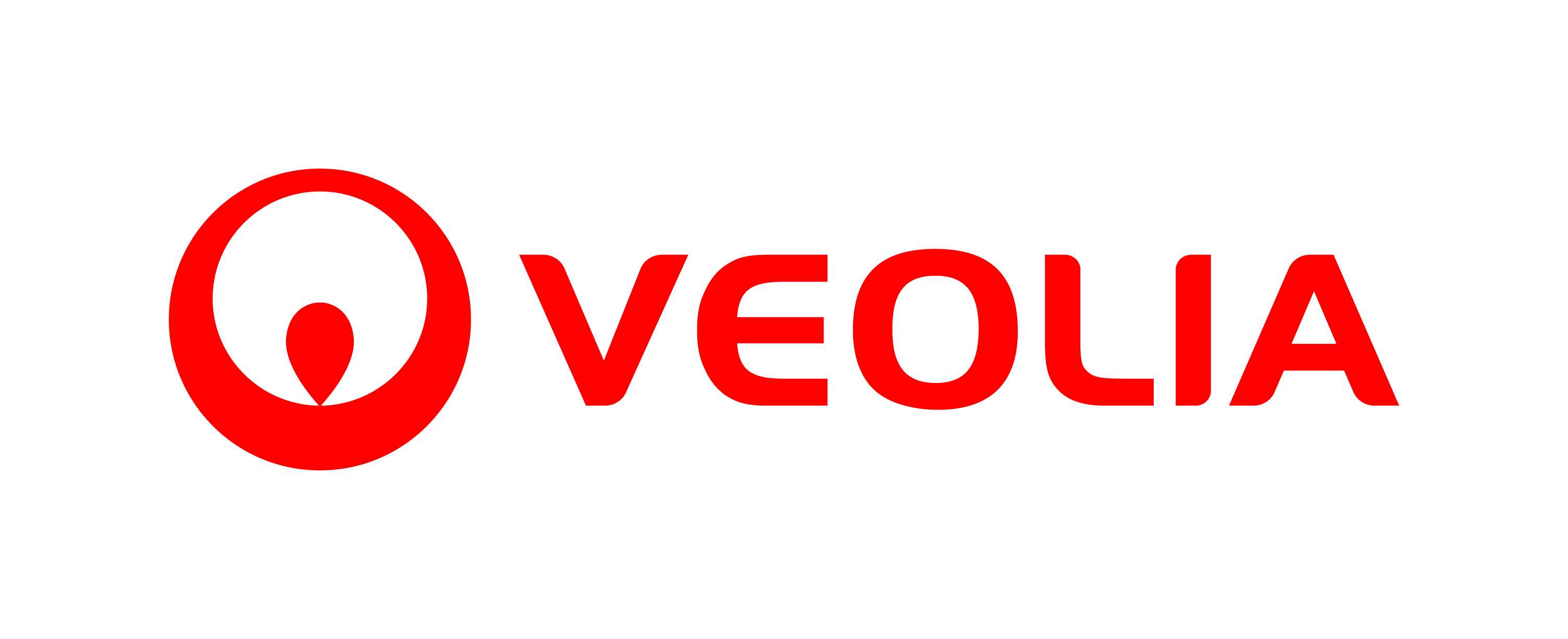 Logo Veolia